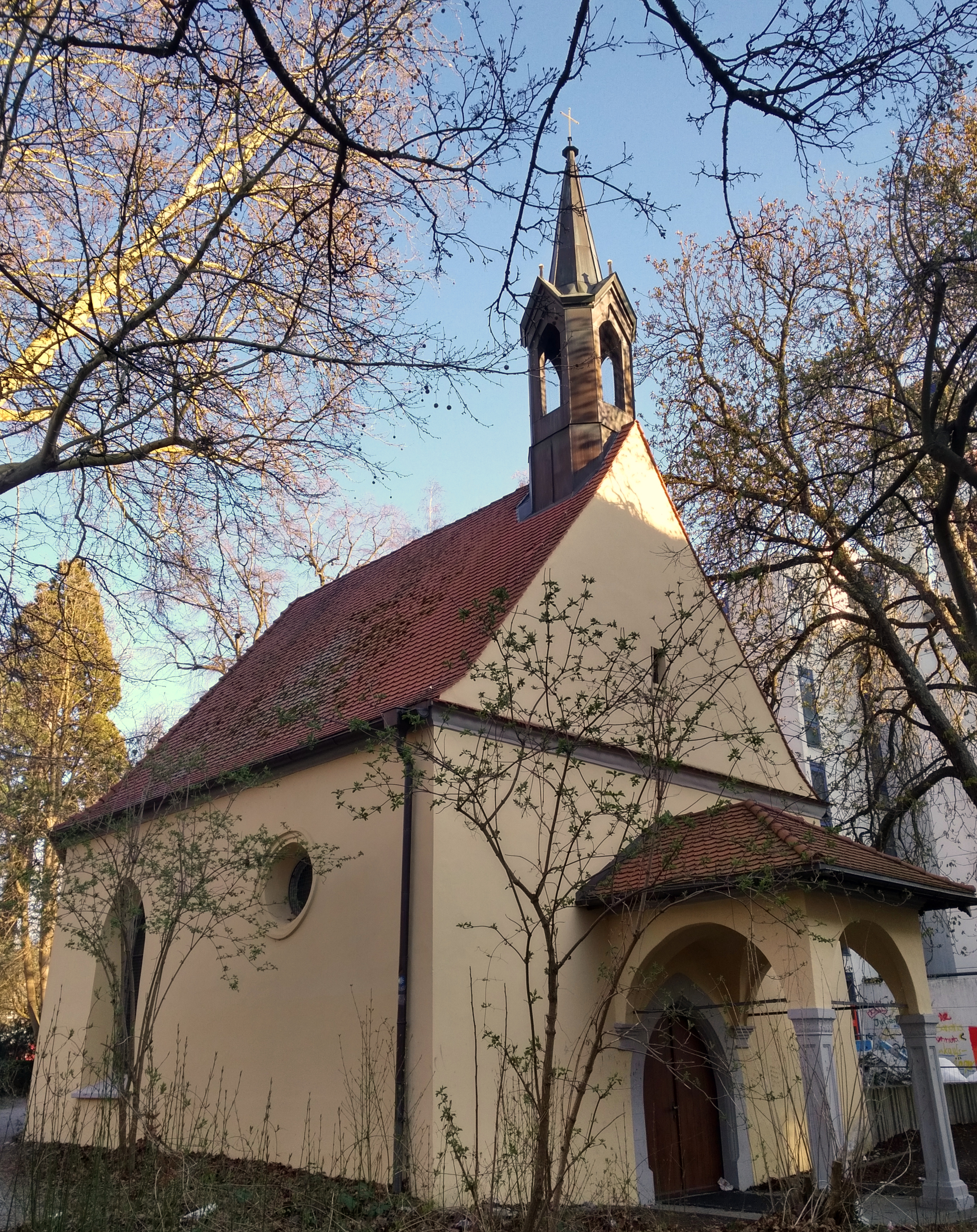 Die Schottenkapelle St. Jakob in Konstanz, am Rand des Schottenplatzes, zwischen Alexander-von-Humboldt-Gymnasium und Vincentius Krankenhaus. Die Kapelle ist eine katholische ehemalige Friedhofskapelle aus dem Jahr 1589; das Gebäude steht unter Denkmalschutz.